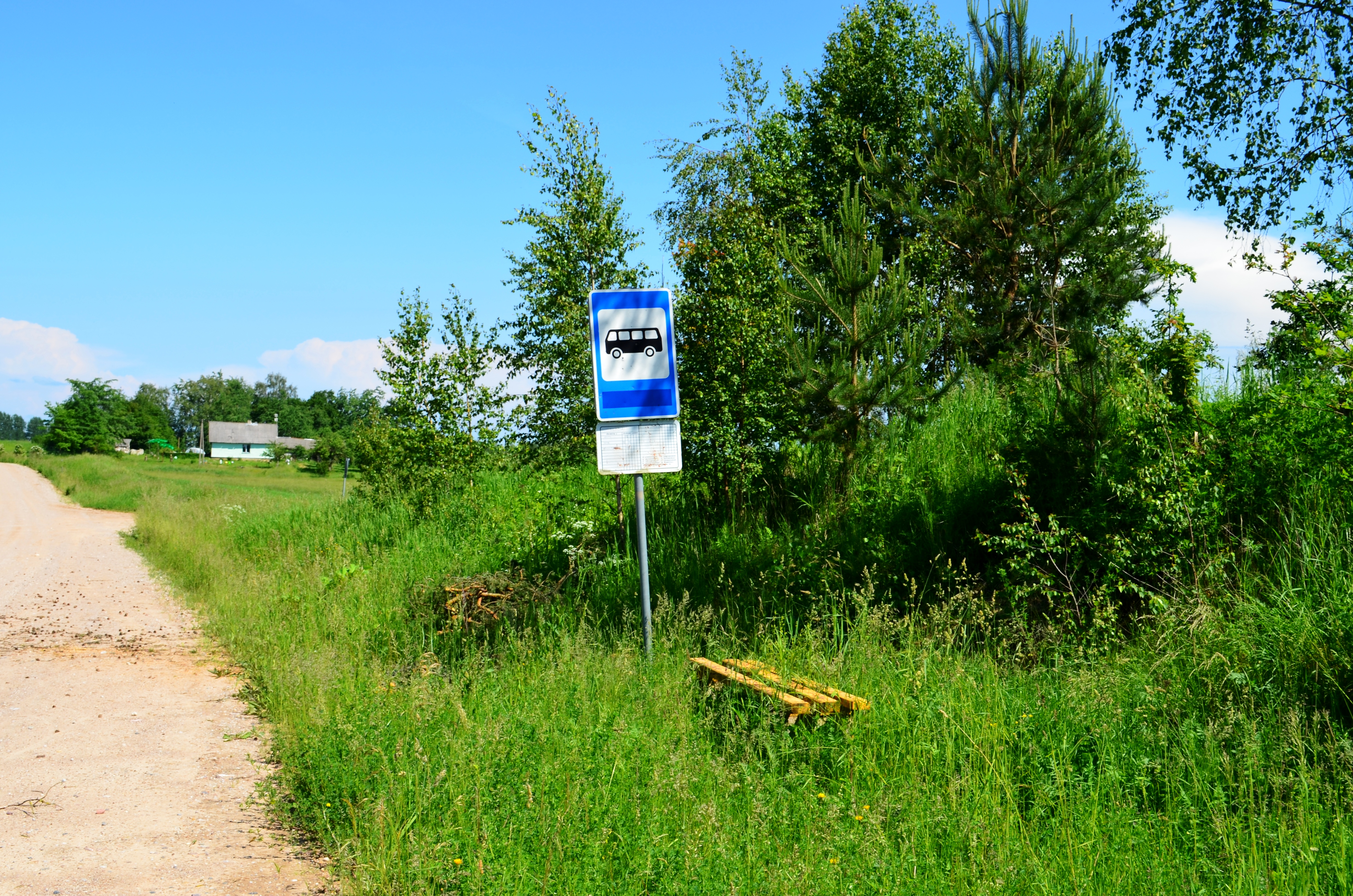 Autobusų stotelė Rudžiuose, Ignalinos r.